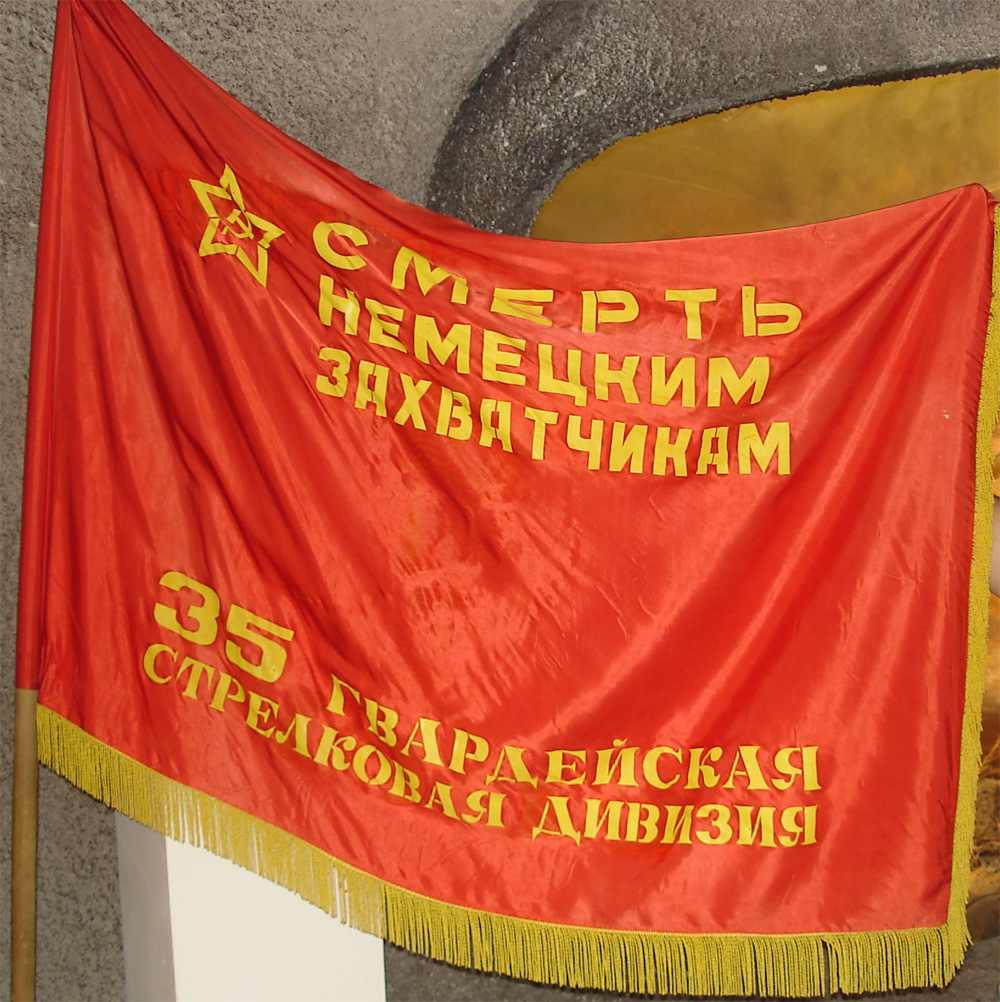 Знамя 35-й гвардейской стрелковой Лозовской Краснознамённой орденов Суворова и Богдана Хмельницкого дивизии